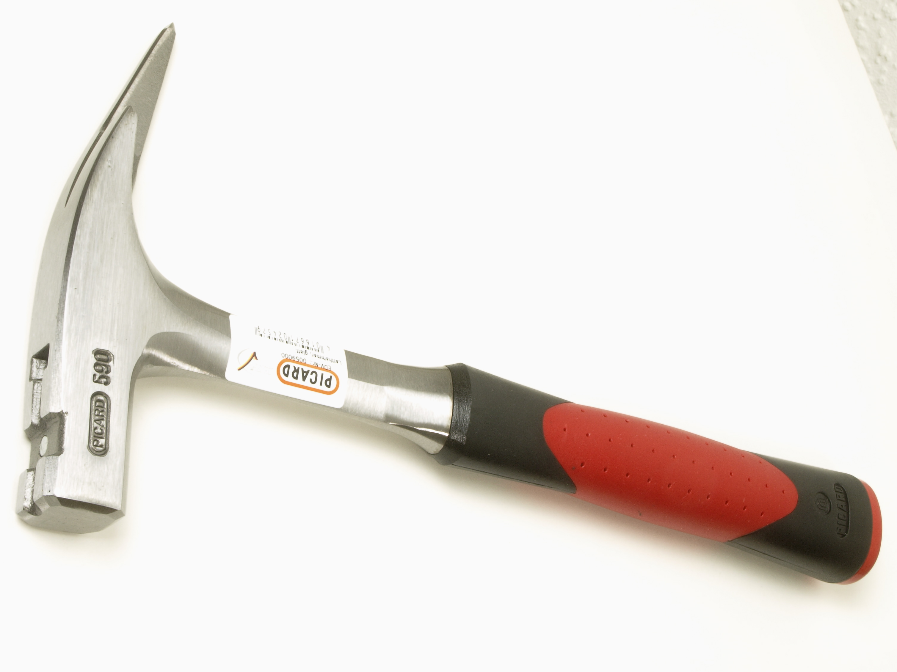 Latthammer in Ganzstahlausführung mit glatter Bahn, magnetischem Nagelhalter und Kunststoffgriff. Picard Nr. 590, 900 g Gesamtmasse